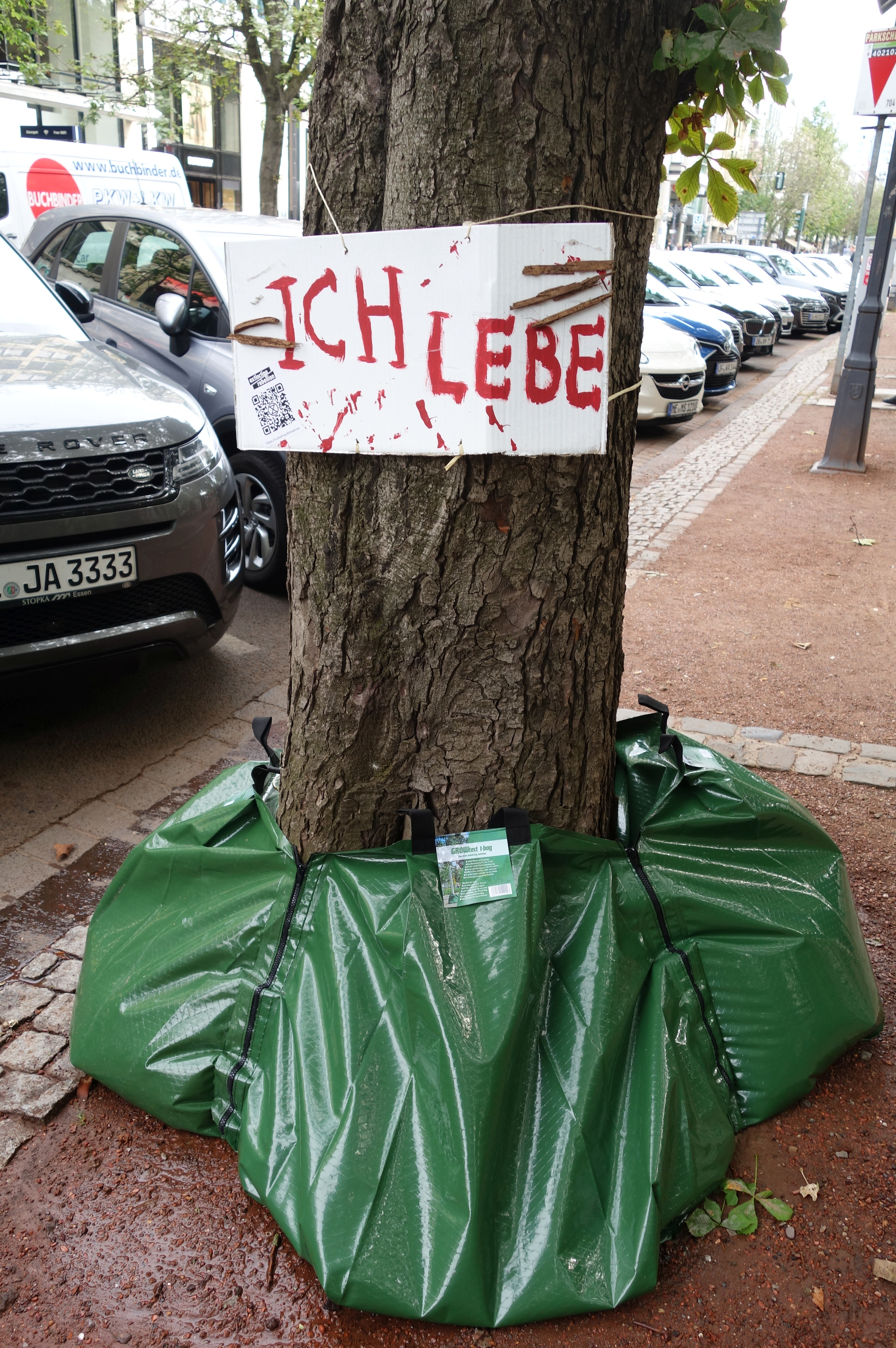 Extinction Rebellion, Ich lebe. Düsseldorf, 20. August 2020. Königsallee